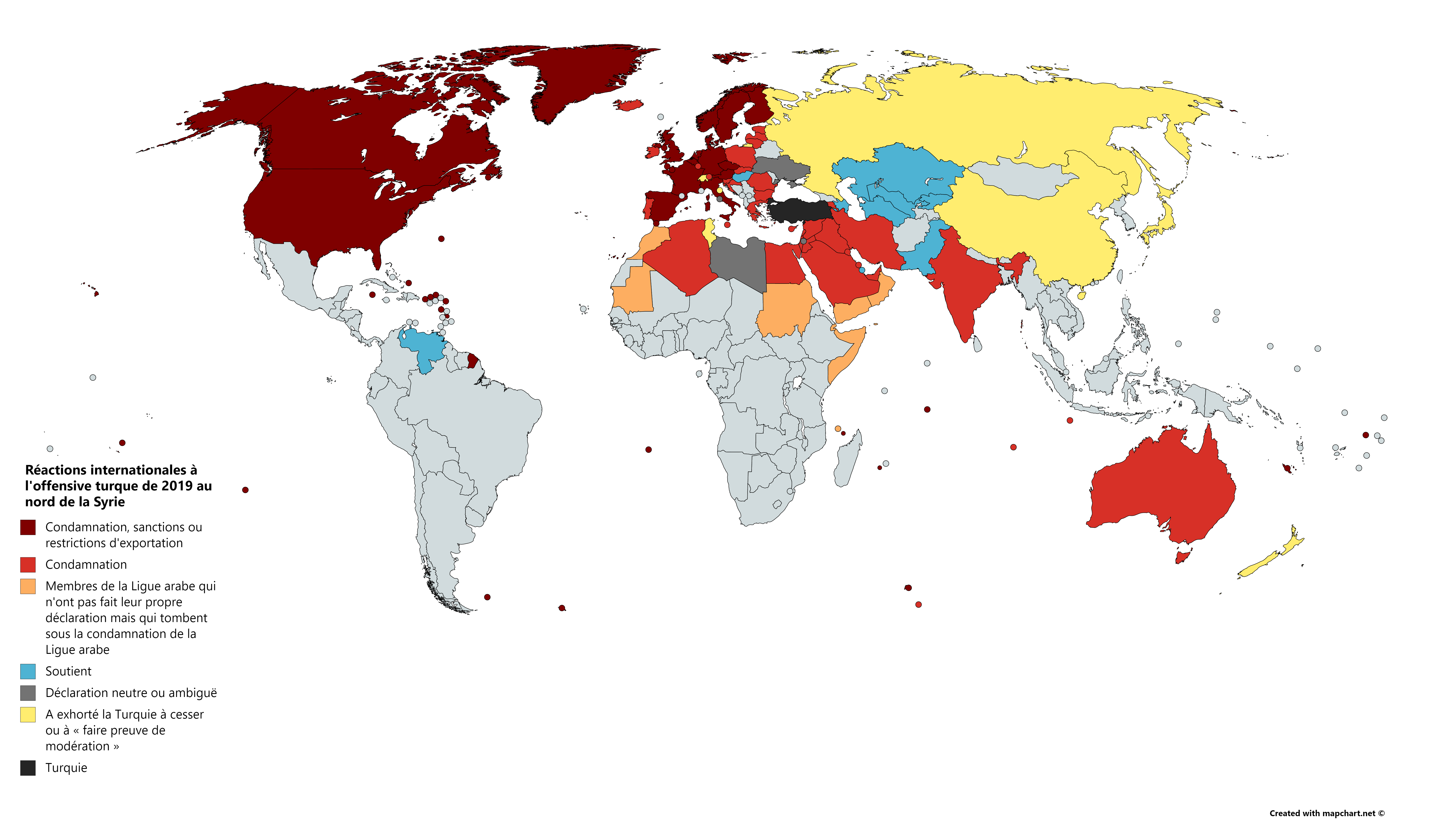 Une carte illustrant les réactions internationales des États membres de l'ONU à l'offensive turque de 2019 dans le nord de la Syrie.